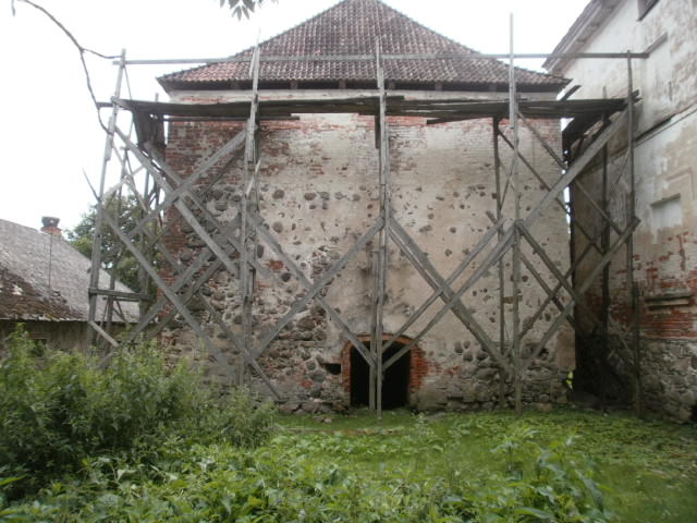 Säilinud tornlinnus läänest.